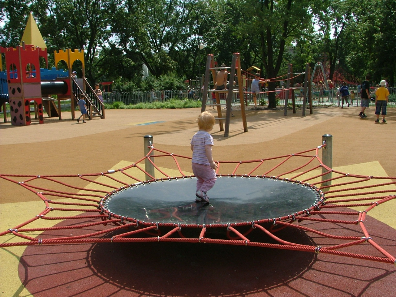 Polska, Park im. Obwodu Praga Armii Krajowej w Warszawie, dzielnica Praga Południe, przy skrzyżowaniu ulic Grochowskiej i Podskarbińskiej